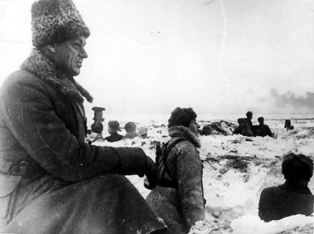 Командующий войсками Донского фронта генерал-лейтенант Рокоссовский К.К. на боевой позиции в р-не г.Сталинграда. 1942 г